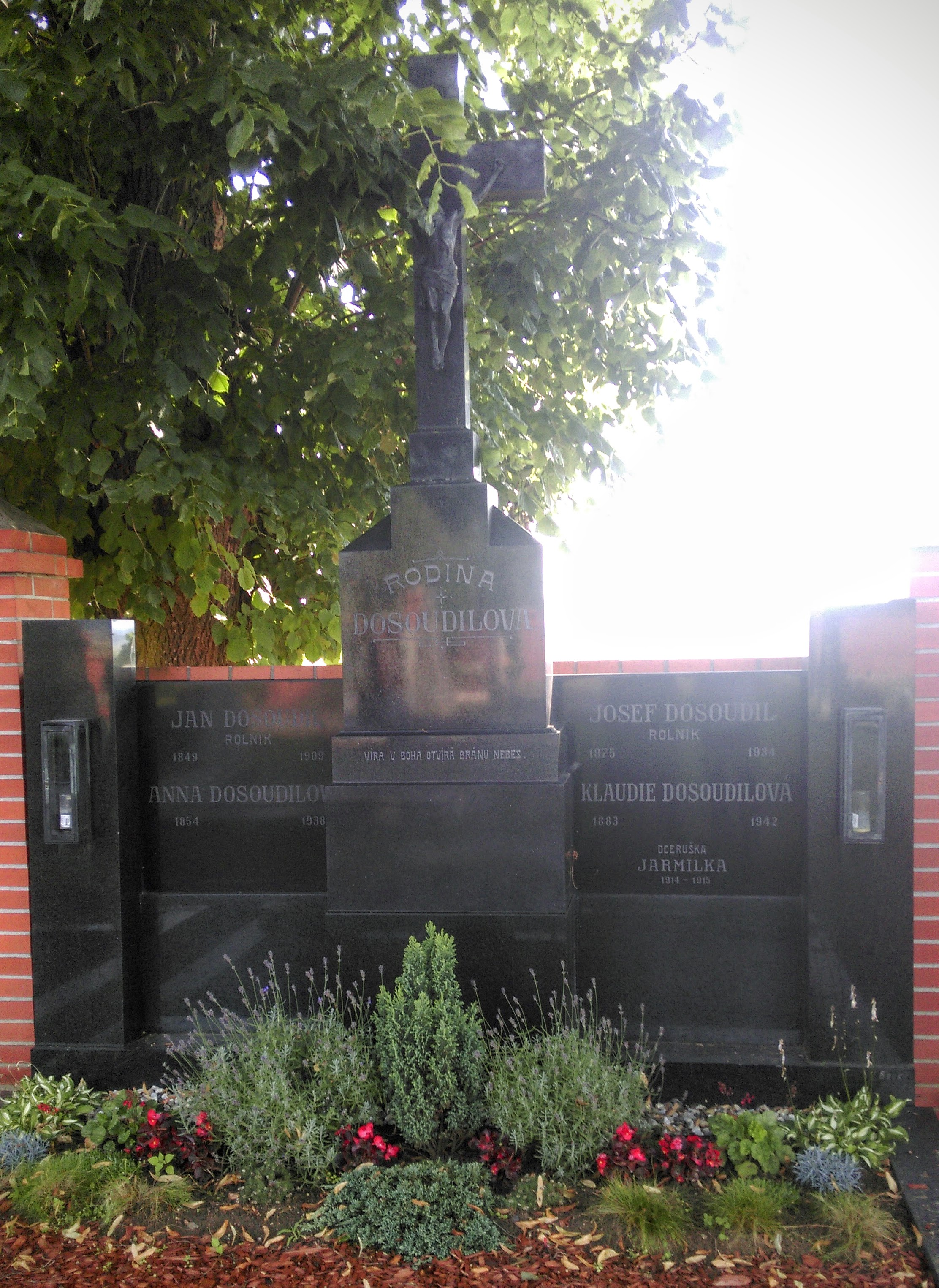 Josef Dosoudil (1875-1934) - poslanec Moravského zemského sněmu